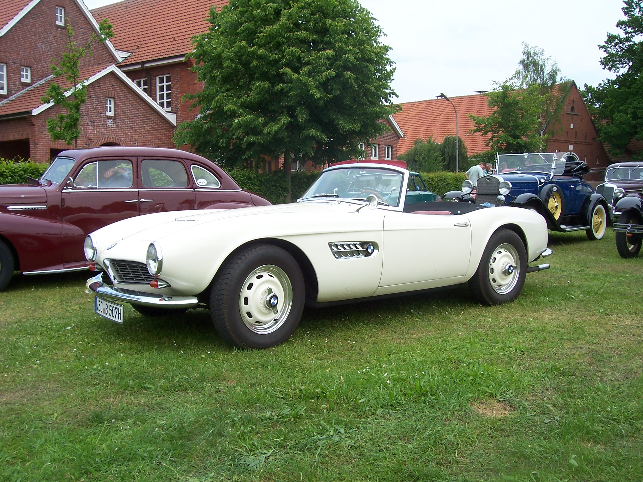 BMW 507 Oldtimerausfahrt Oldtimerfreunde Emsland